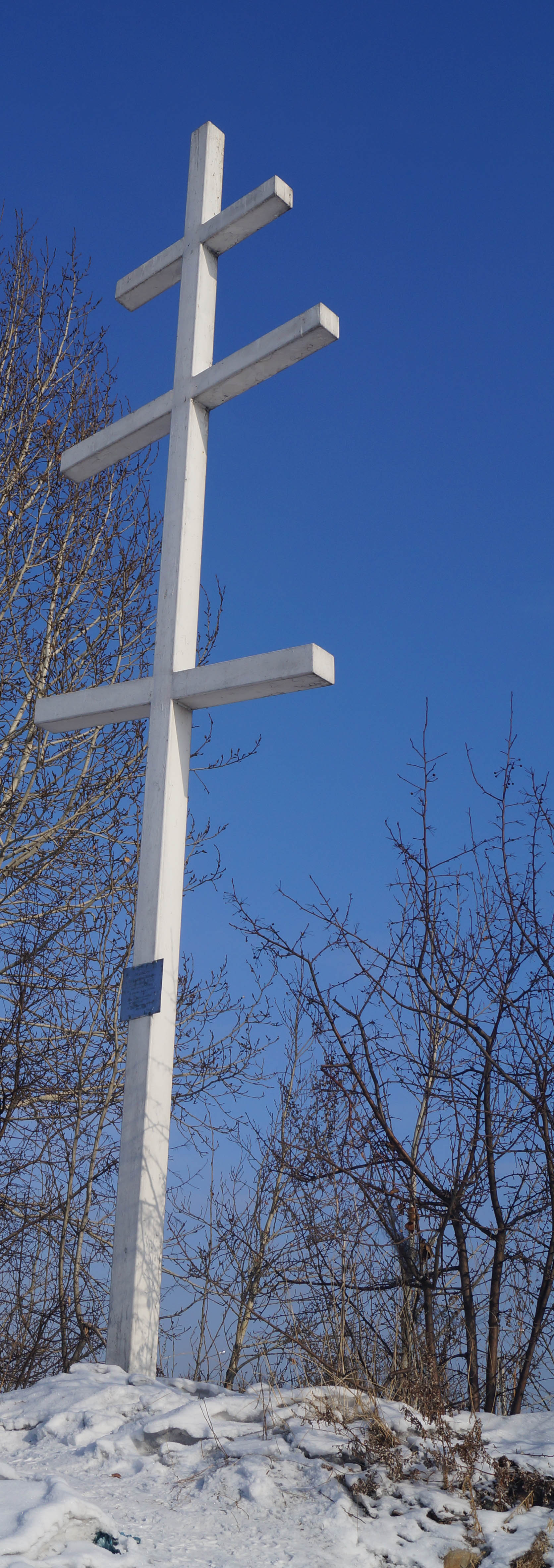 Православный крест на месте предполагаемого убийства адмирала А.В. Колчака и В.Н. Пепеляева на берегу р. Ангары